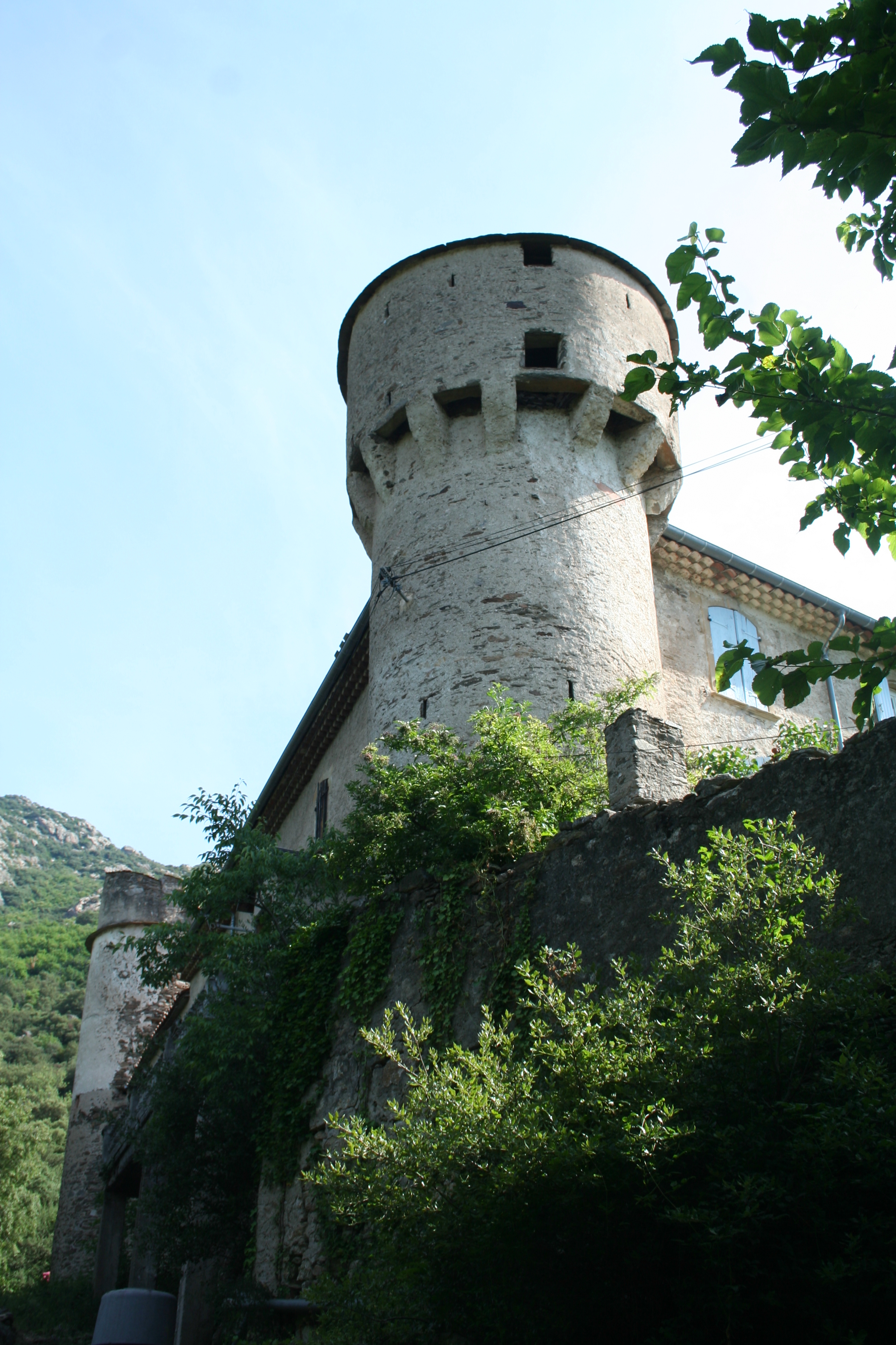 Colombières-sur-Orb (Hérault) - tour du château